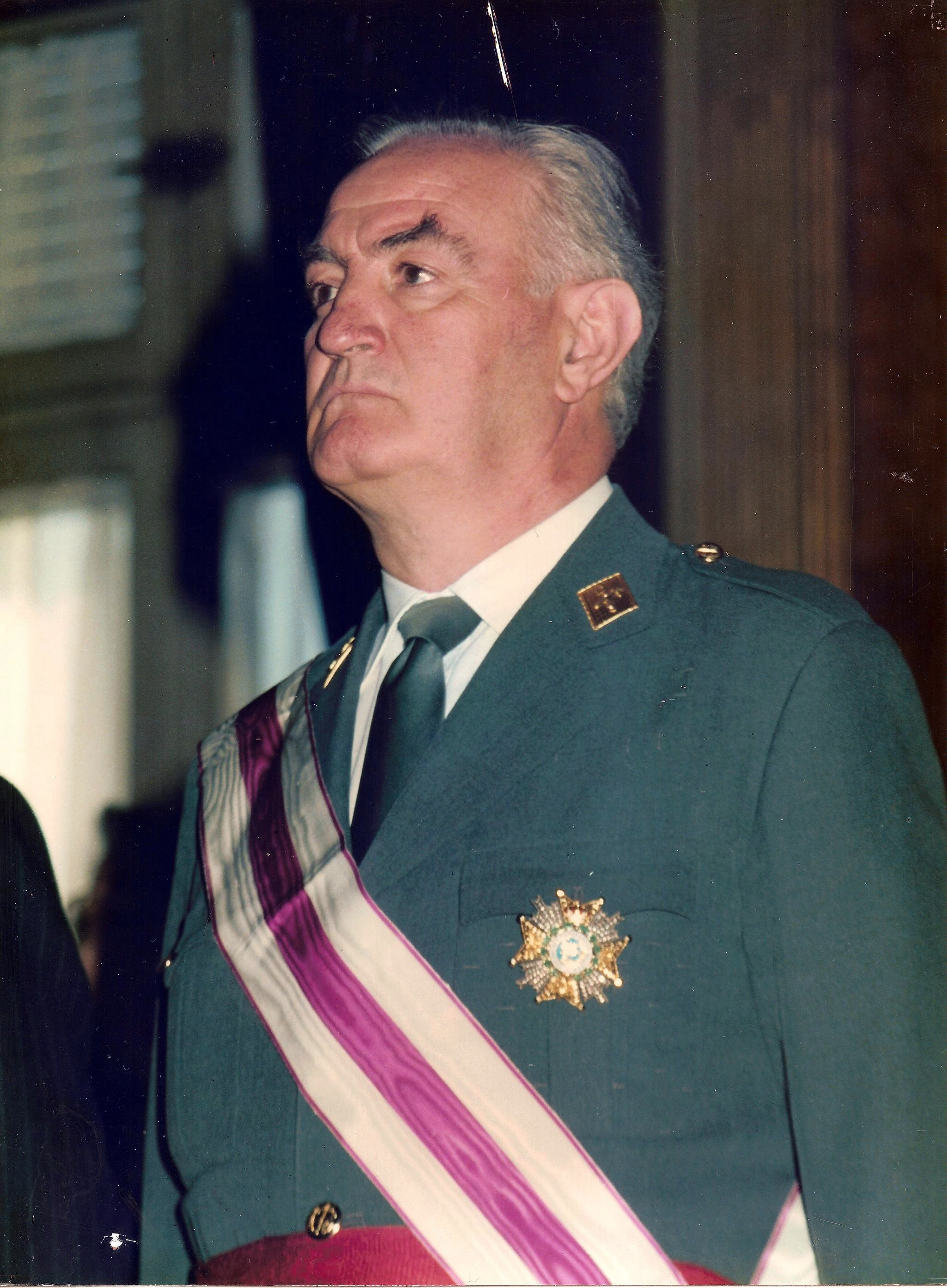 Imposición de la gran Cruza de San Hermenegildo